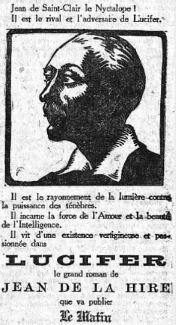 Encart publicitaire du roman-feuilleton Lucifer de Jean de La Hire. Extrait de l'édition du quotidien Le Matin du 17 novembre 1921.